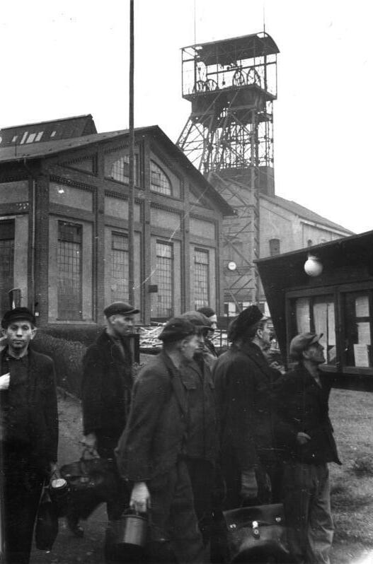 Zwickau, Schacht Brückenberg I Illus-Cürlis Schacht Brückenberg I im Zwickauer Steinkohlenrevier. 1948 2622-48 [Zwickau.- Bergarbeiter vor einem Informationskasten.]